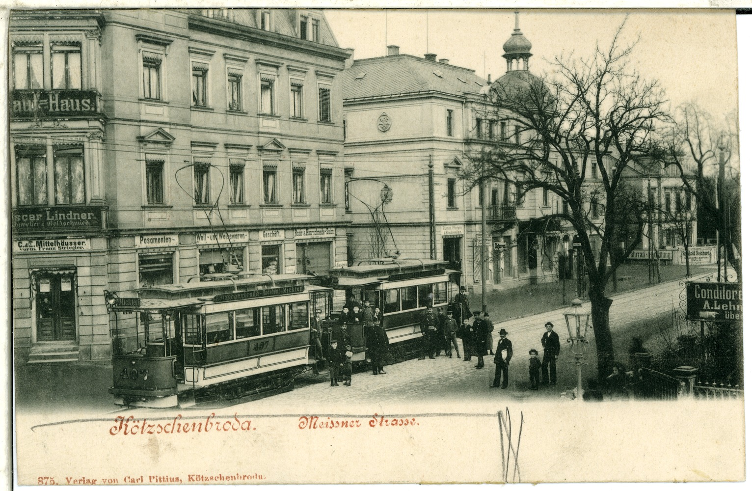 Kötzschenbroda; Meißner Straße mit Straßenbahn This postcard is from publisher Brück & Sohn in Meißen ( postcard has a unique number 00875 and is available in a higher resolution at the publisher. This images was uploaded in a cooperation project between Wikipedians and the publisher.